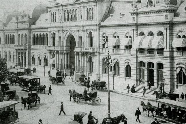 La imagen más antigua de la Casa de Gobierno tal como se la conoce hoy; 26 de octubre de 1898